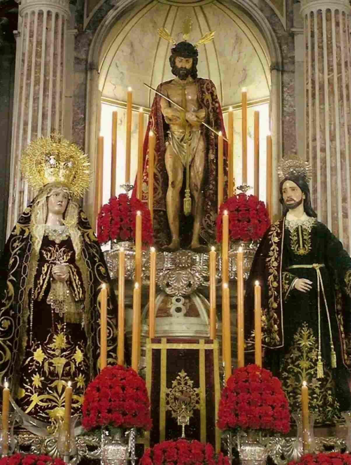 Jesús del Ecce-Homo, María Santísima de las Angustias y San Juan Evangelista, titulares de la Real y Venerables Archicofradía de Penitencia de Nuestro Jesús del Ecce-Homo, María Santísima de las Angustias y San Juan Evangelista, de la ciudad de Cádiz.